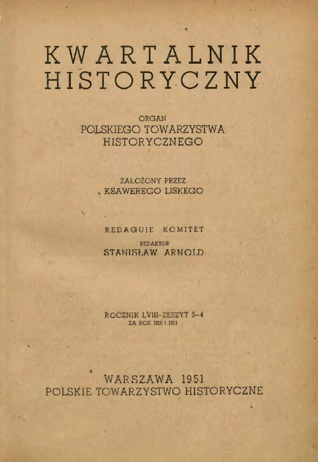 Kwartalnik Historyczny. R. 58 z. 1-2, 1951. Warszawa. ISSN 0023-5903